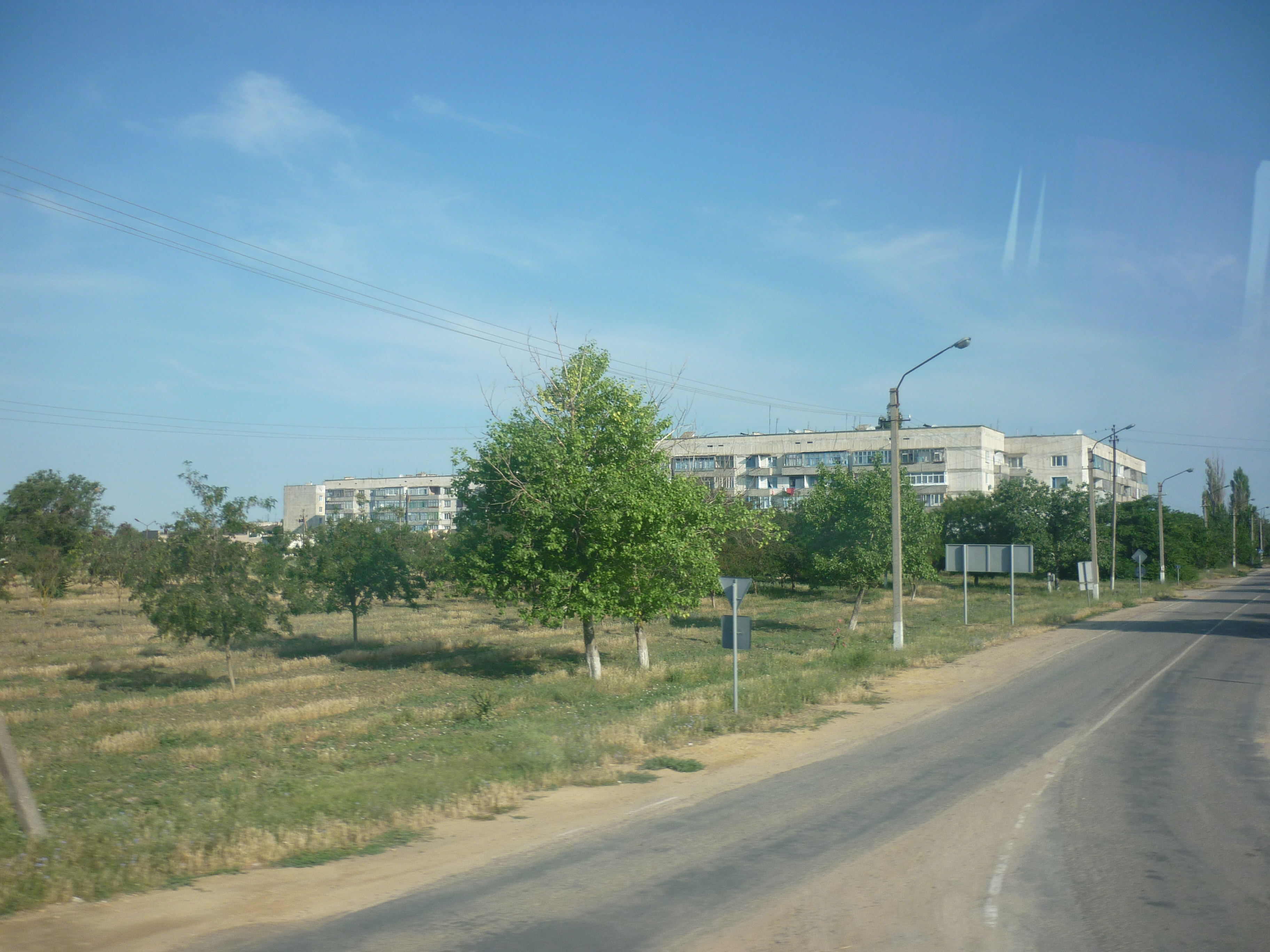 смт Роздольне Автономної республіки Крим